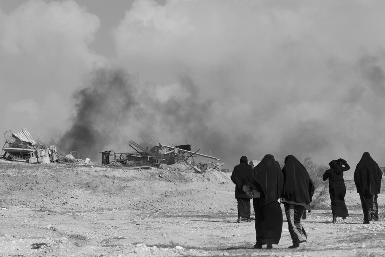 מראות באום אל - חיראן ביום השני שלאחר הפינוי. נשים שצועדות במרחבי הרס הפינוי.